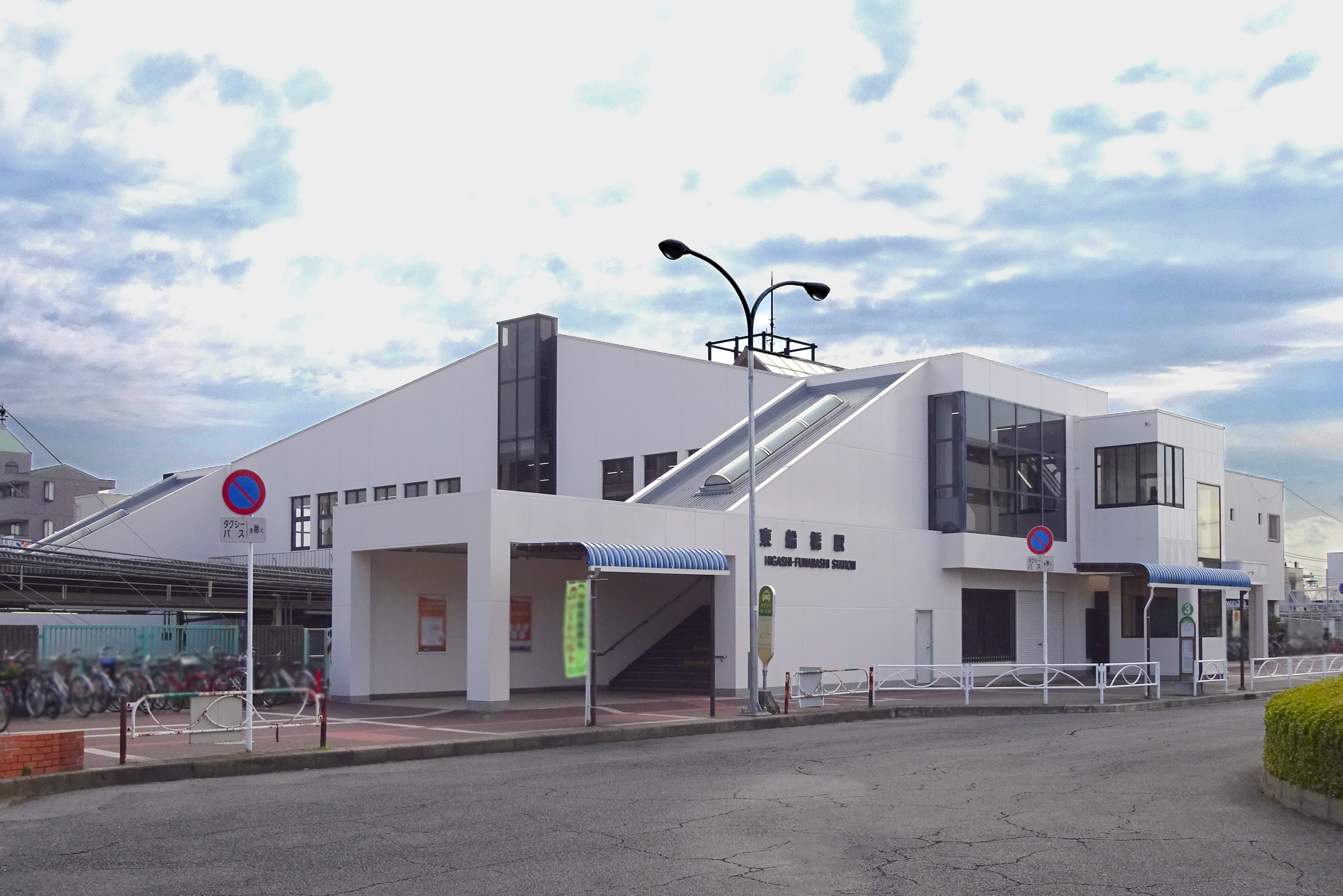 東船橋駅（cropped）